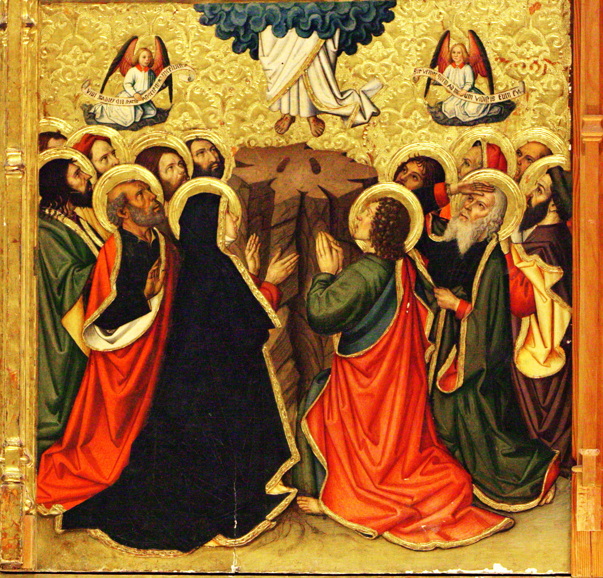 Taula de l'Ascensió de Crist del “Retaule de la transfiguració” de Jaume Huguet a la sala de l´antic refectori dels canonges, de la catedral de Tortosa. La seva ubicació original era a la capella central de la girola, darrera l'altar major.